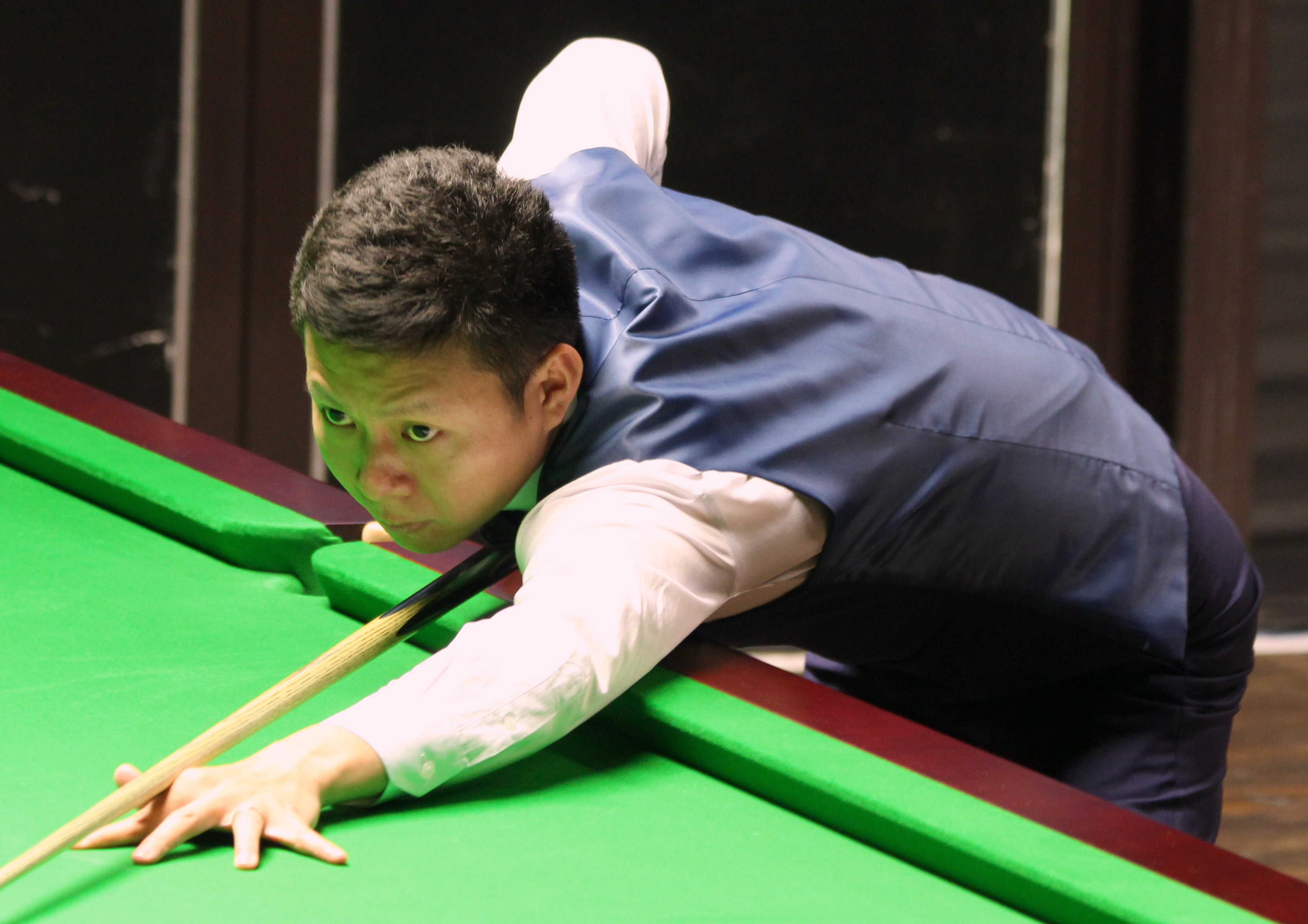 Mei Xiwen beim Paul Hunter Classic 2016